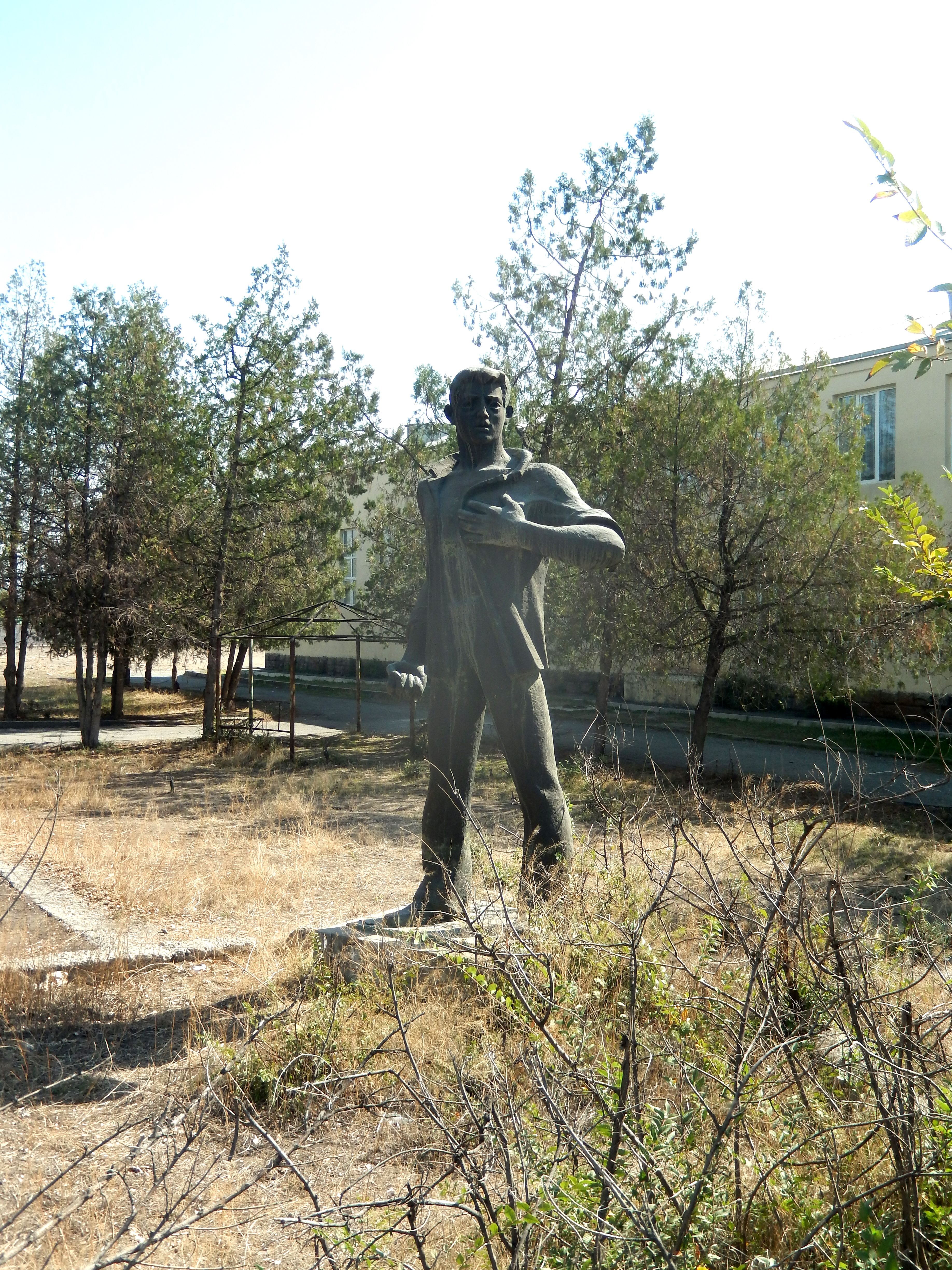 Ghukas Ghukasyan's monument, Ghukasavan 56/3